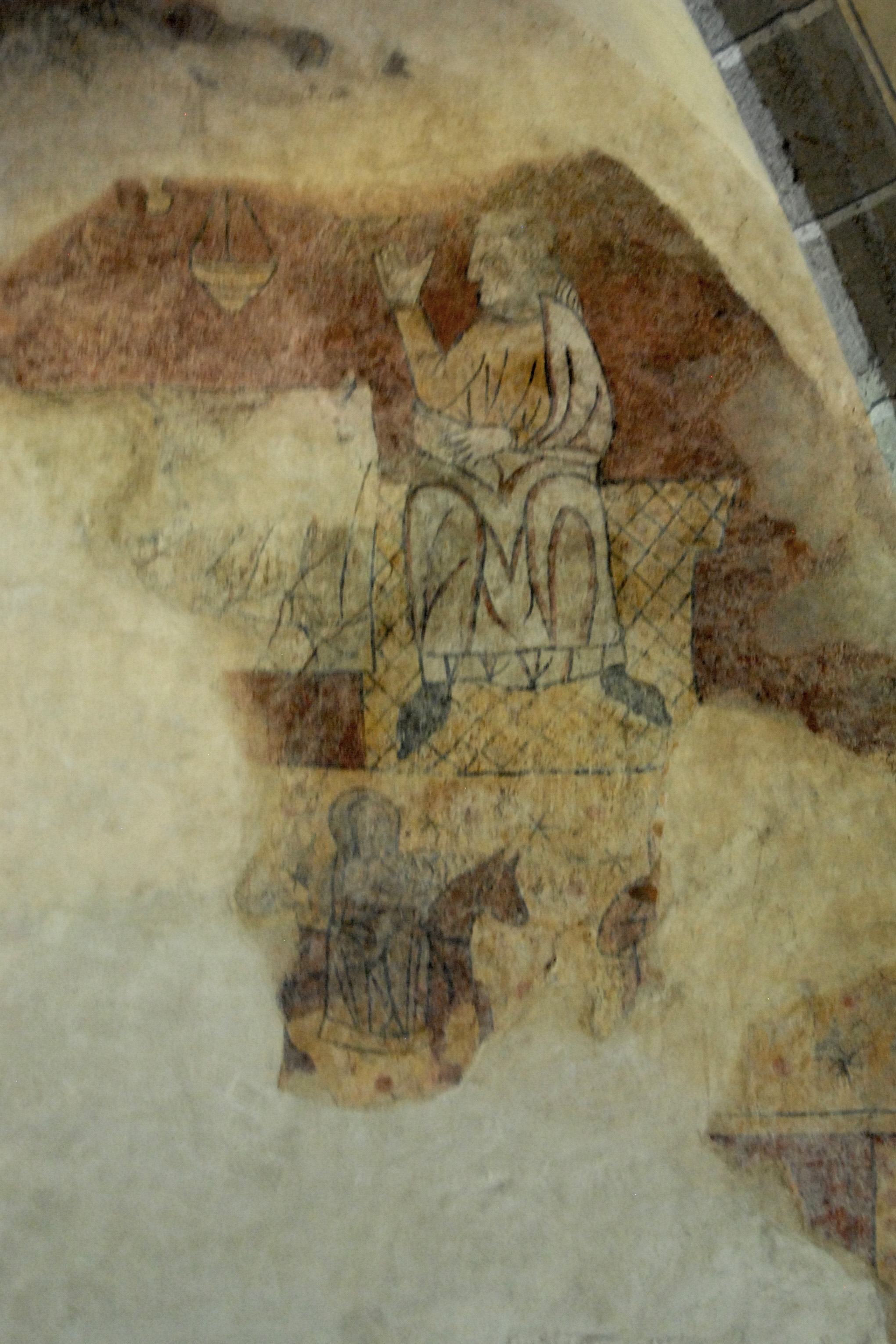 Kirche St.-André Lavaudieu,Seitenschiff, Freskenreste